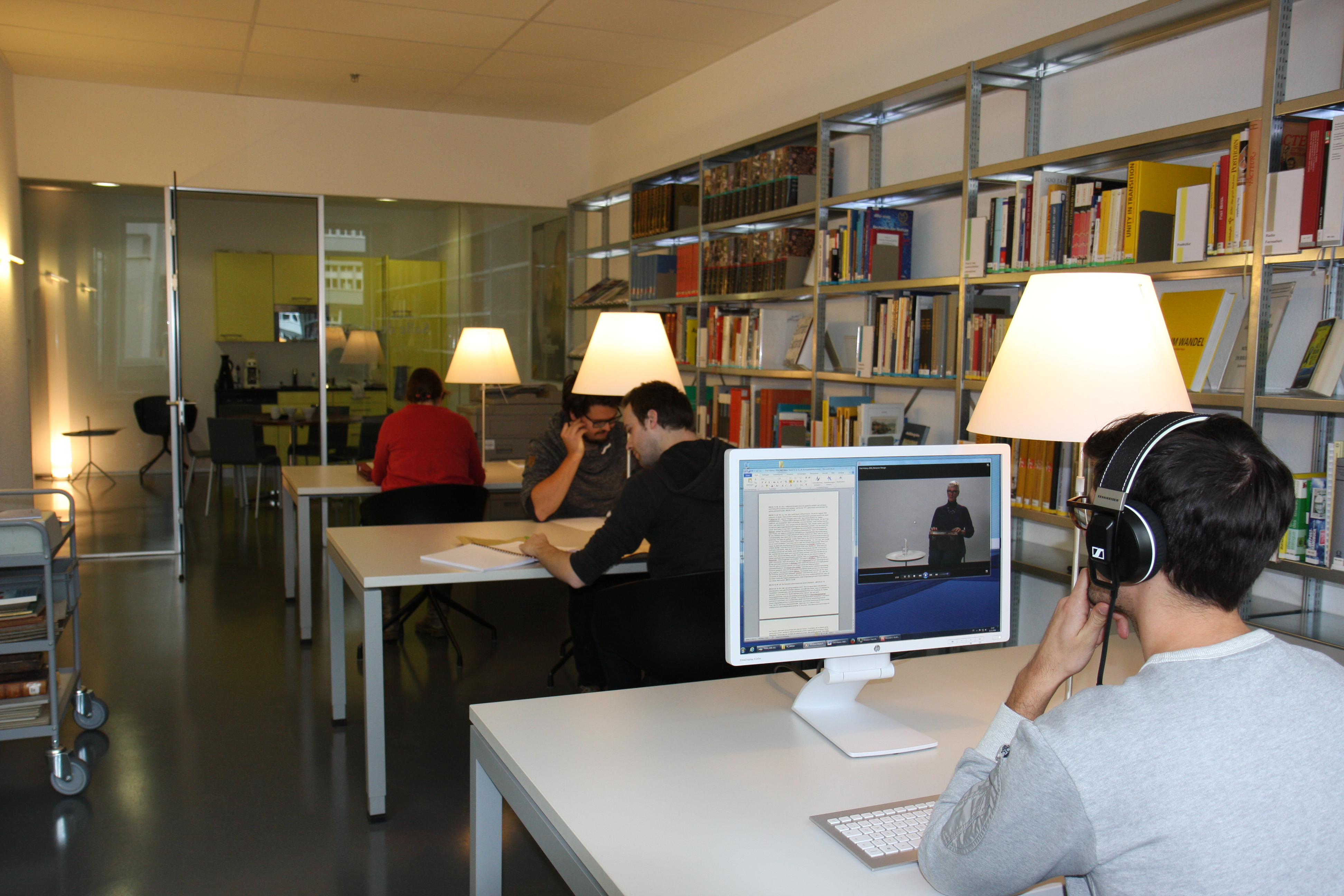 Historisches Archiv und Bibliothek PTT, Lesesaal